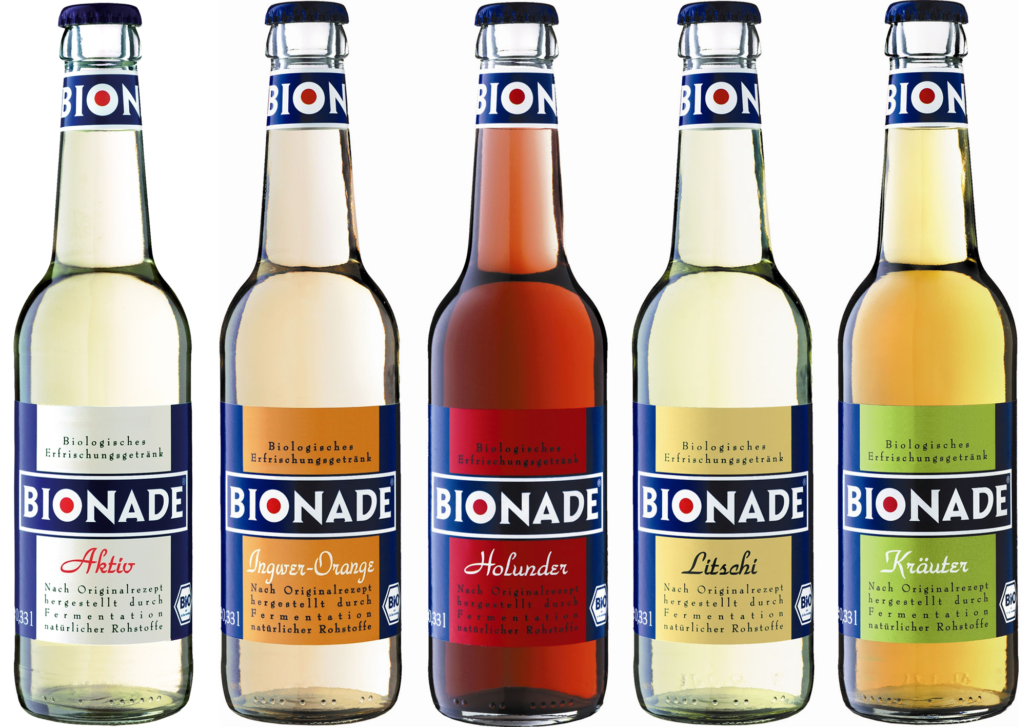 Flaschen der Limonadenmarke „Bionade“ in der Geschmacksrichtung Forte, Ingwer-Orange, Holunder, Litschi, Kräuter